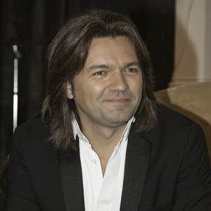 Дмитрий Маликов на 50-летии программы «Спокойной ночи, малыши!».